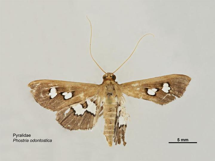 Phostria odontostica, dorsal view.